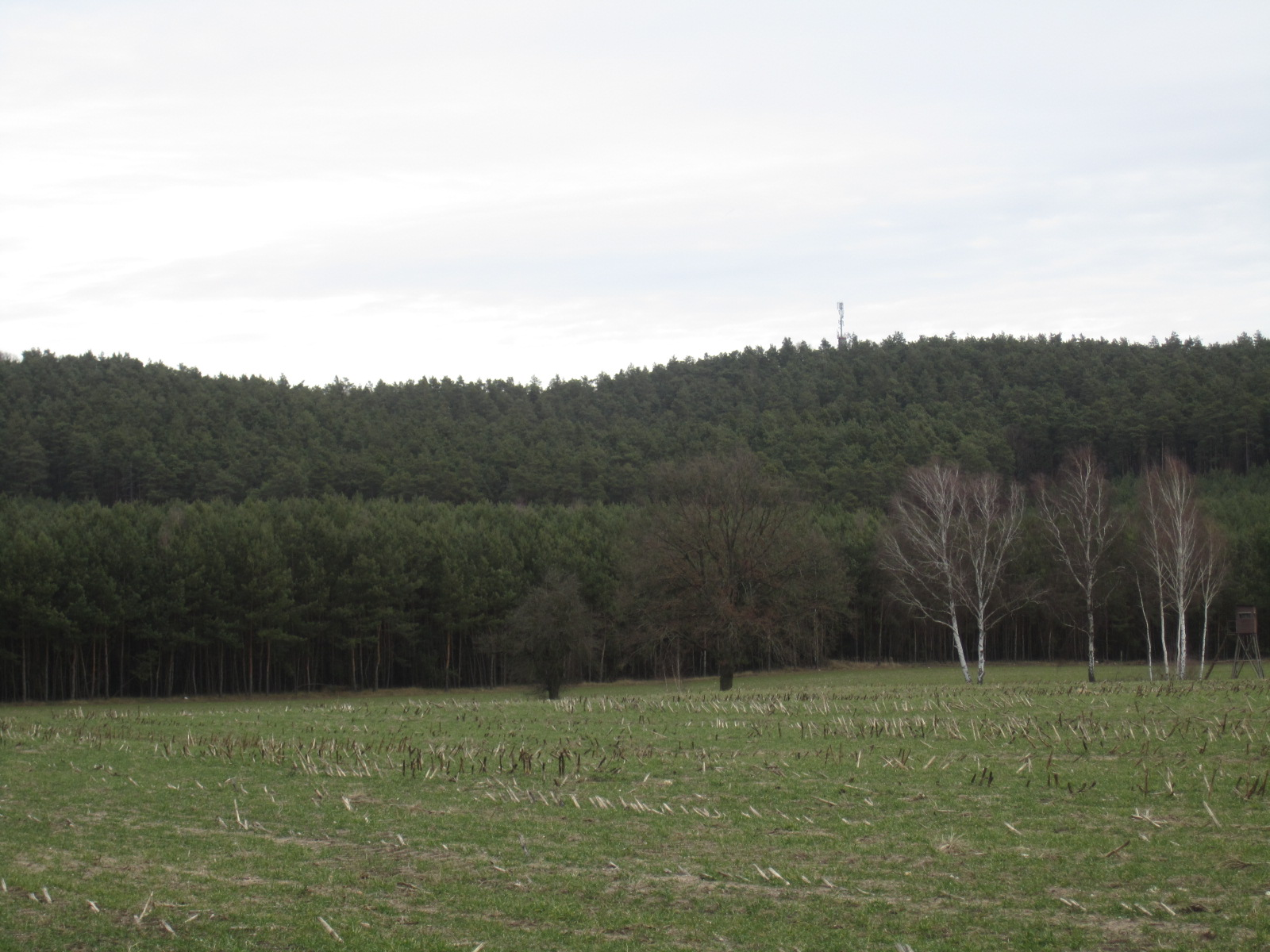 Dubrower Berge aus Südwest